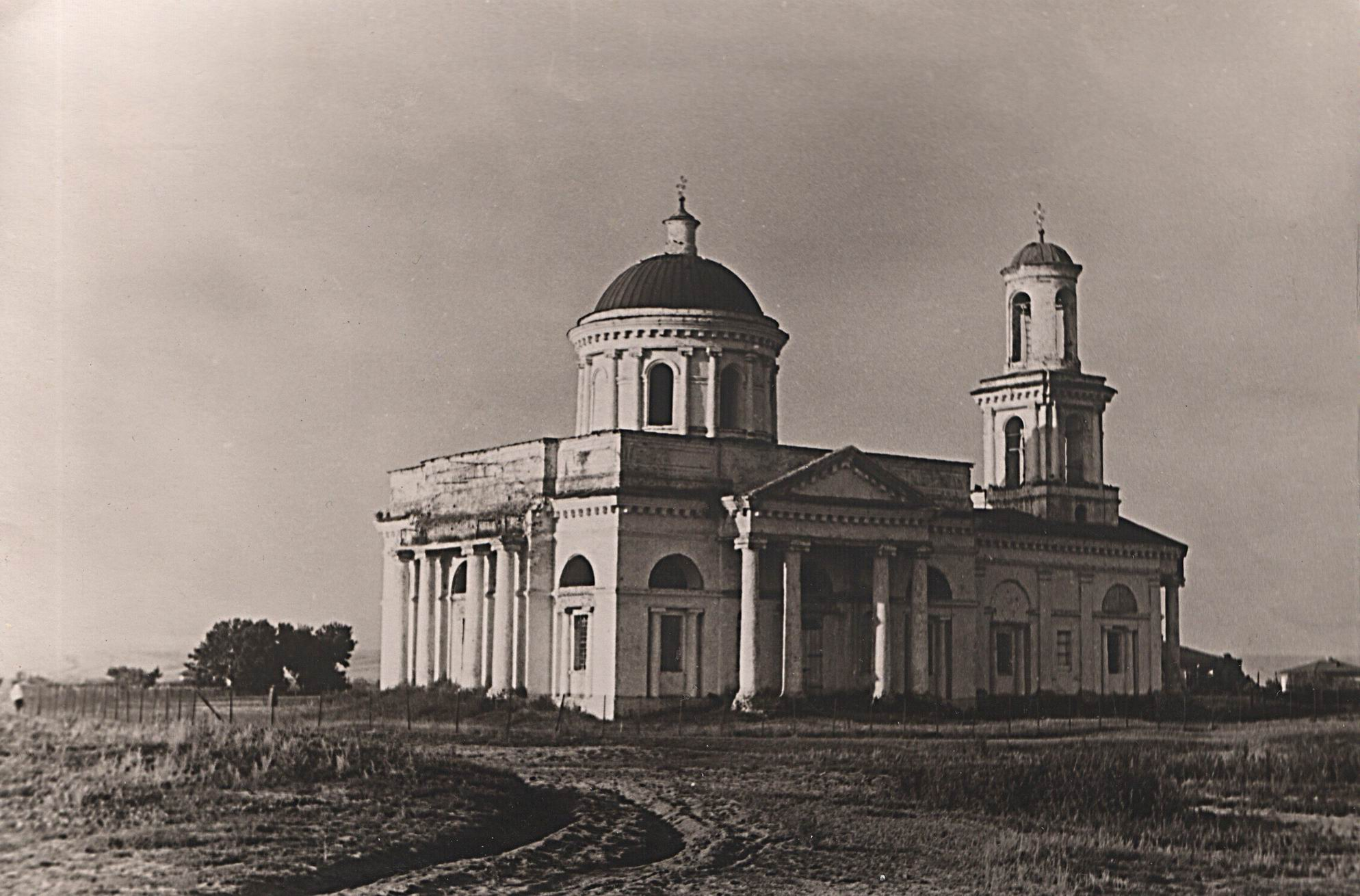 Область Войска Донского, Верхне-Донской округ, станица Еланская, Николаевская церковь (1920-е годы).